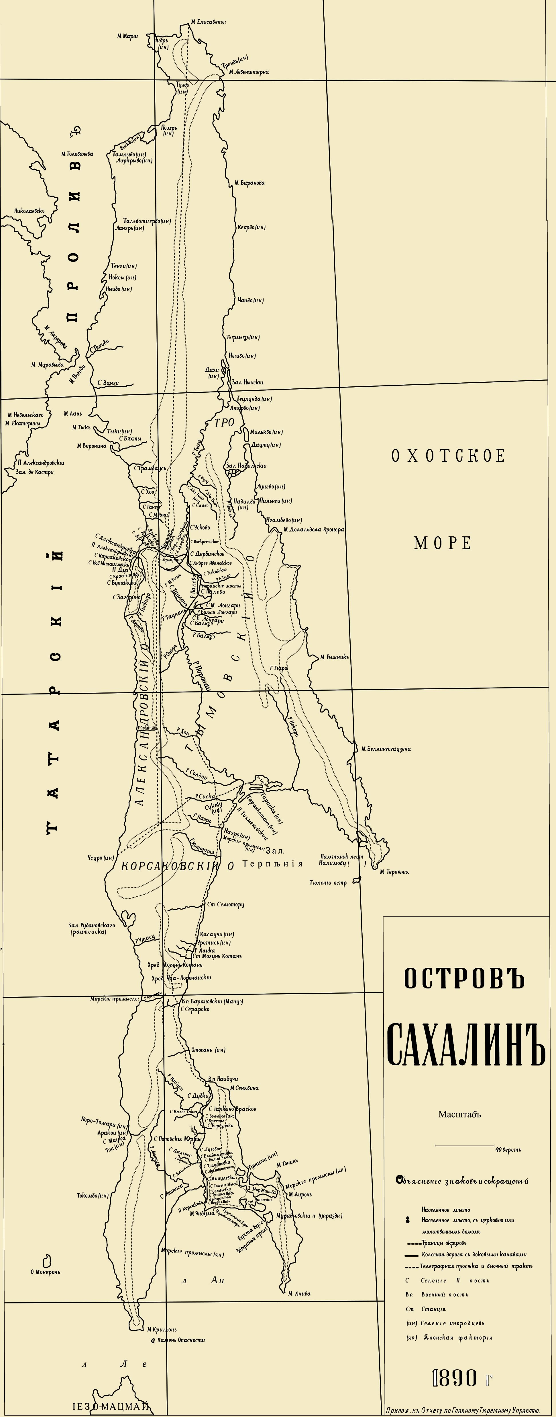 административная карта о. Сахалин, 1890 г.